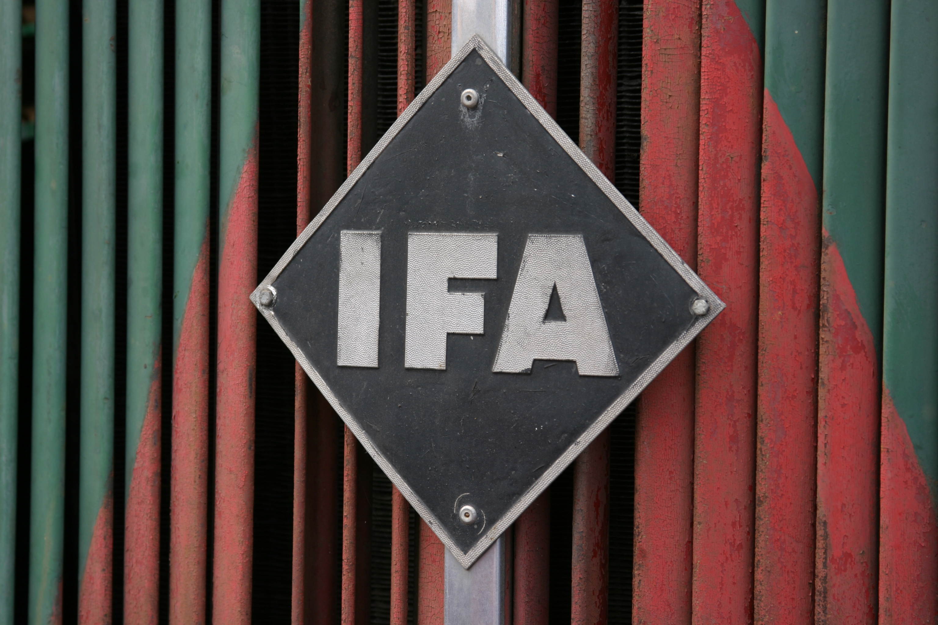 IFA-Logo am 10. IFA-Oldtimertreffen im Ernst-Grube Werk Werdau/Sachsen, 2007.